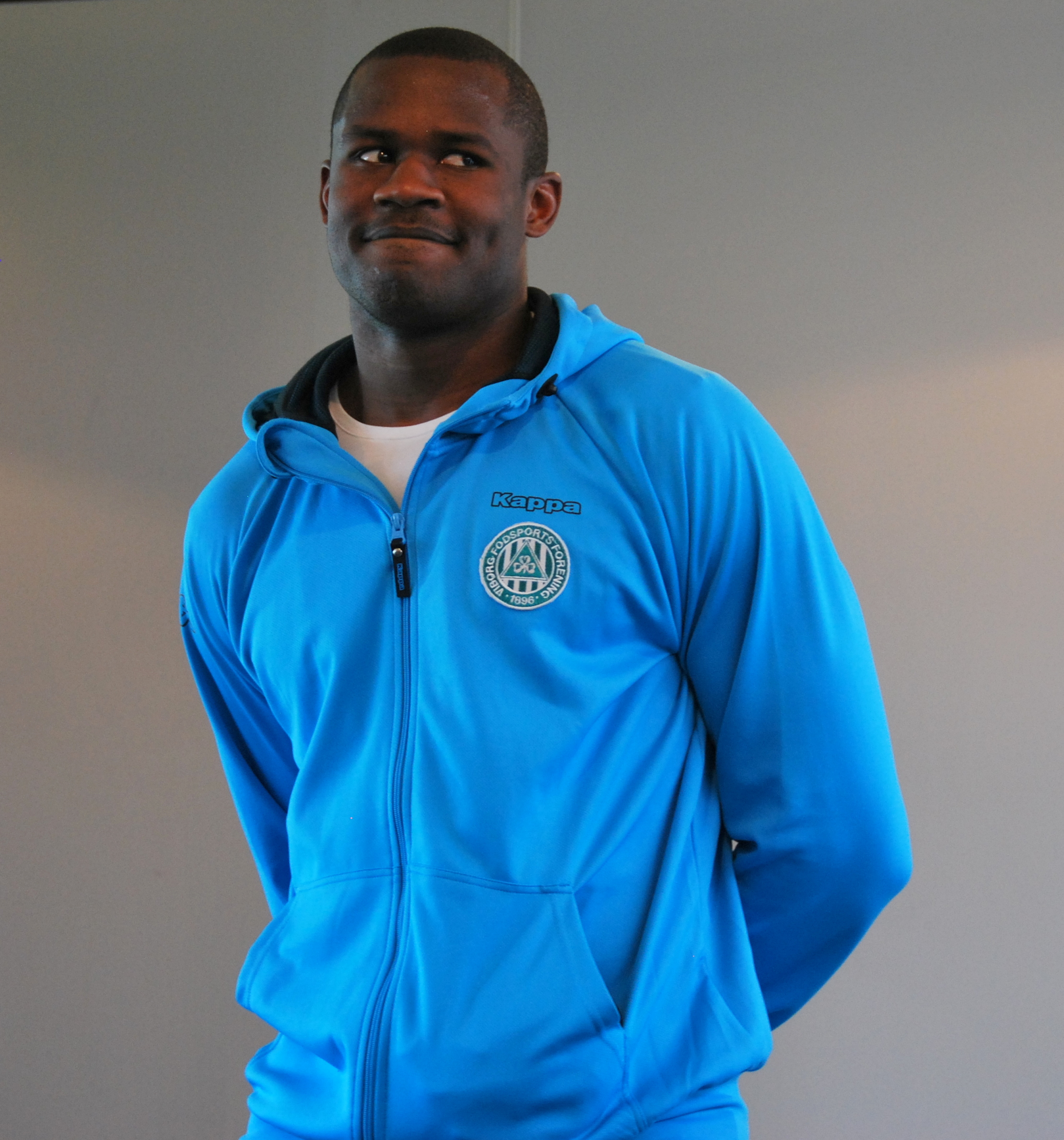 Fodboldspilleren Babajide Ogunbiyi fra Viborg FF. Her ved præsentation af spillertruppen for foråret 2012.